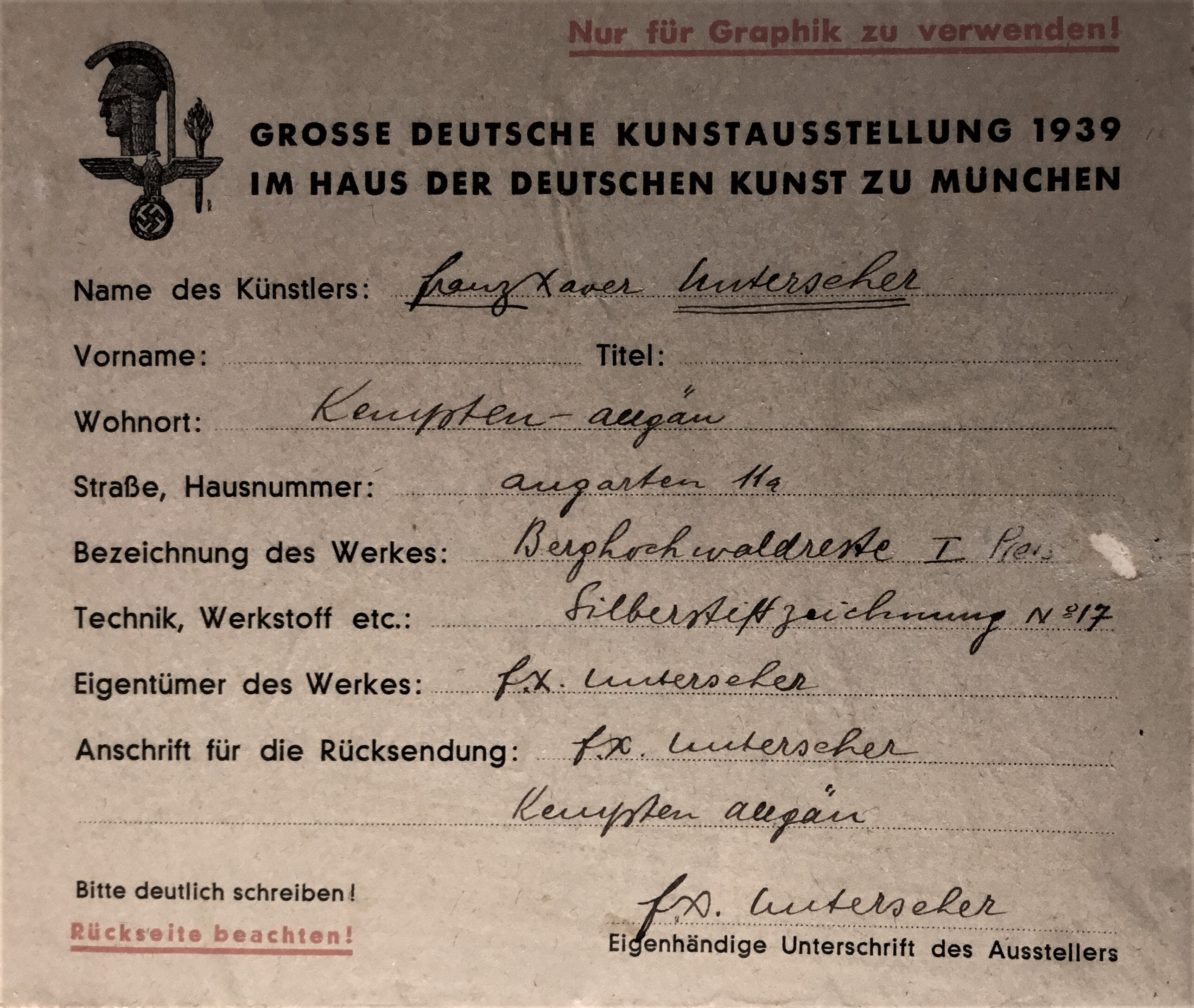 Zur Einlieferung von Kunstwerken wurden seinerzeit Begleitzettel an der Rückseite des Kunstwerks befestigt. Diese dienten zur Identifizierung der Arbeit und enthielten auch die Versandadresse für die Rückgabe der Kunstwerke.